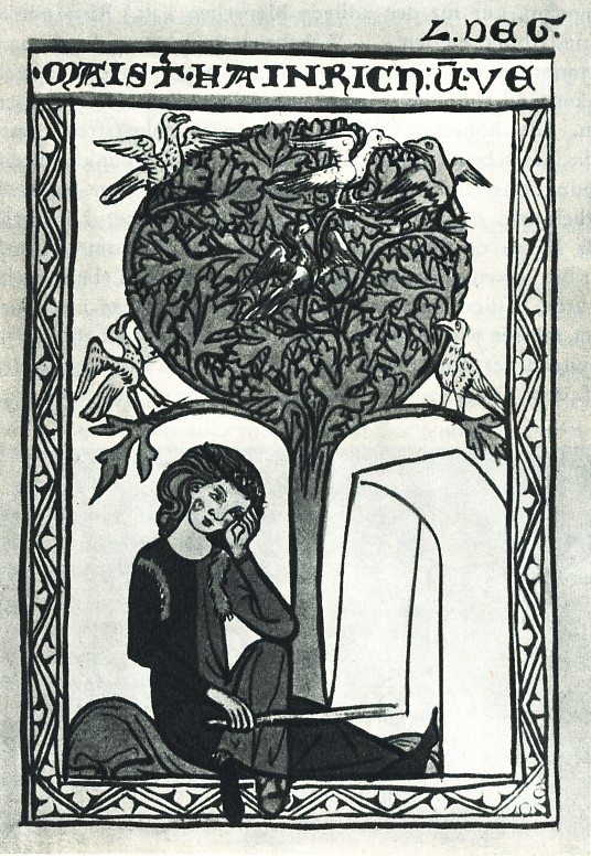 Portrait des mittelalterlichen Dichters Heinrich von Veldeke in der Weingartner Liederhandschrift.